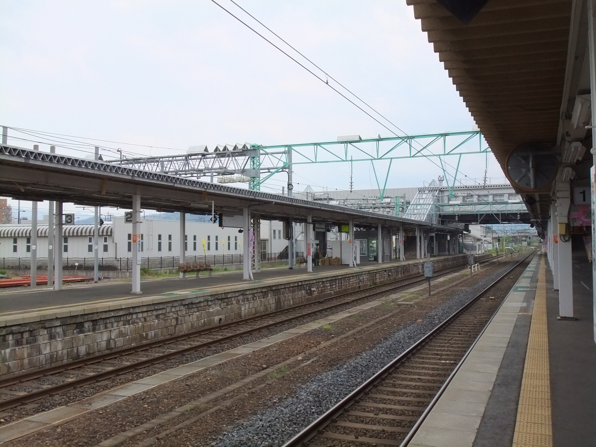 米沢駅 駅構内の様子